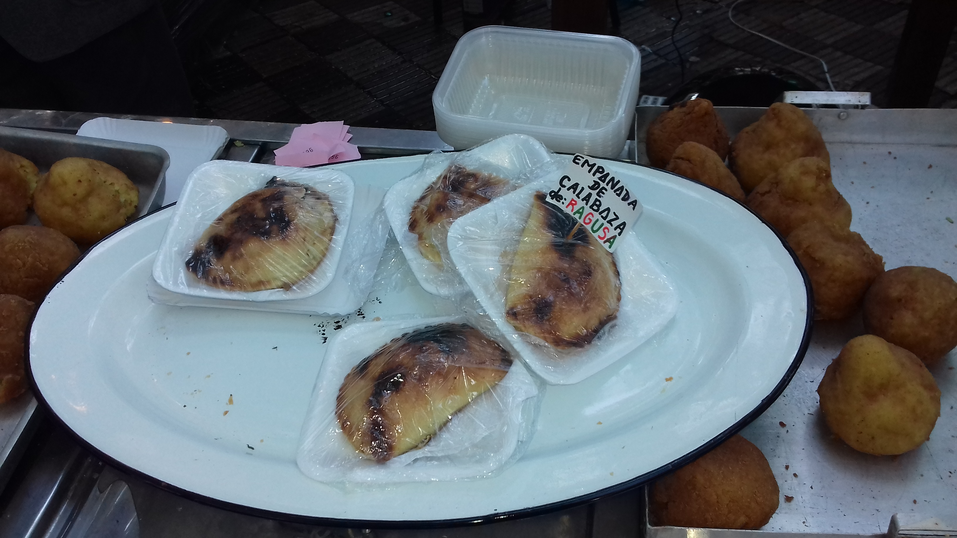 Fotografía obtenida durante la 3° edición de la Fiesta Italiana en Asunción, Paraguay (2019).